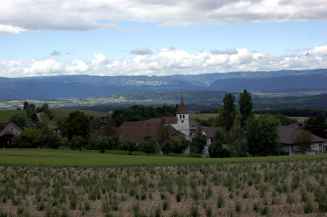 Frienisberg - Dorf mit Klosterturm, Hintergrund Seeland und Jura - DSC03827.JPG